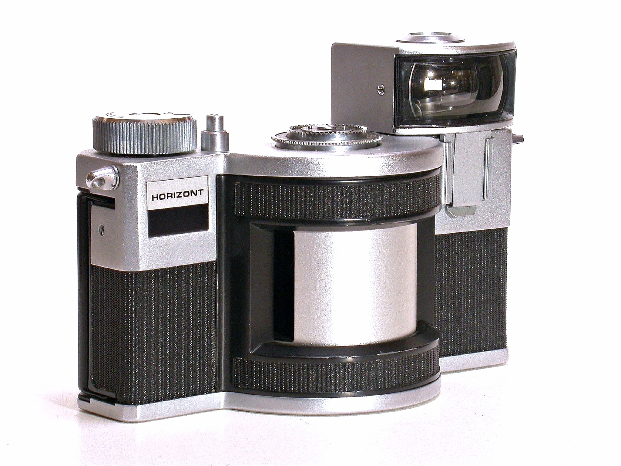 Horizont 35mm Panoramic